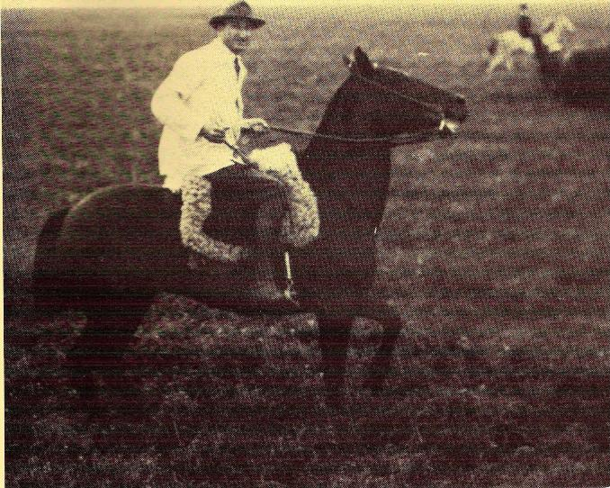 Foto de Juan Alberto Harriet